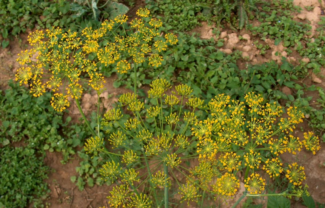 Dill (Anethum graveolens)